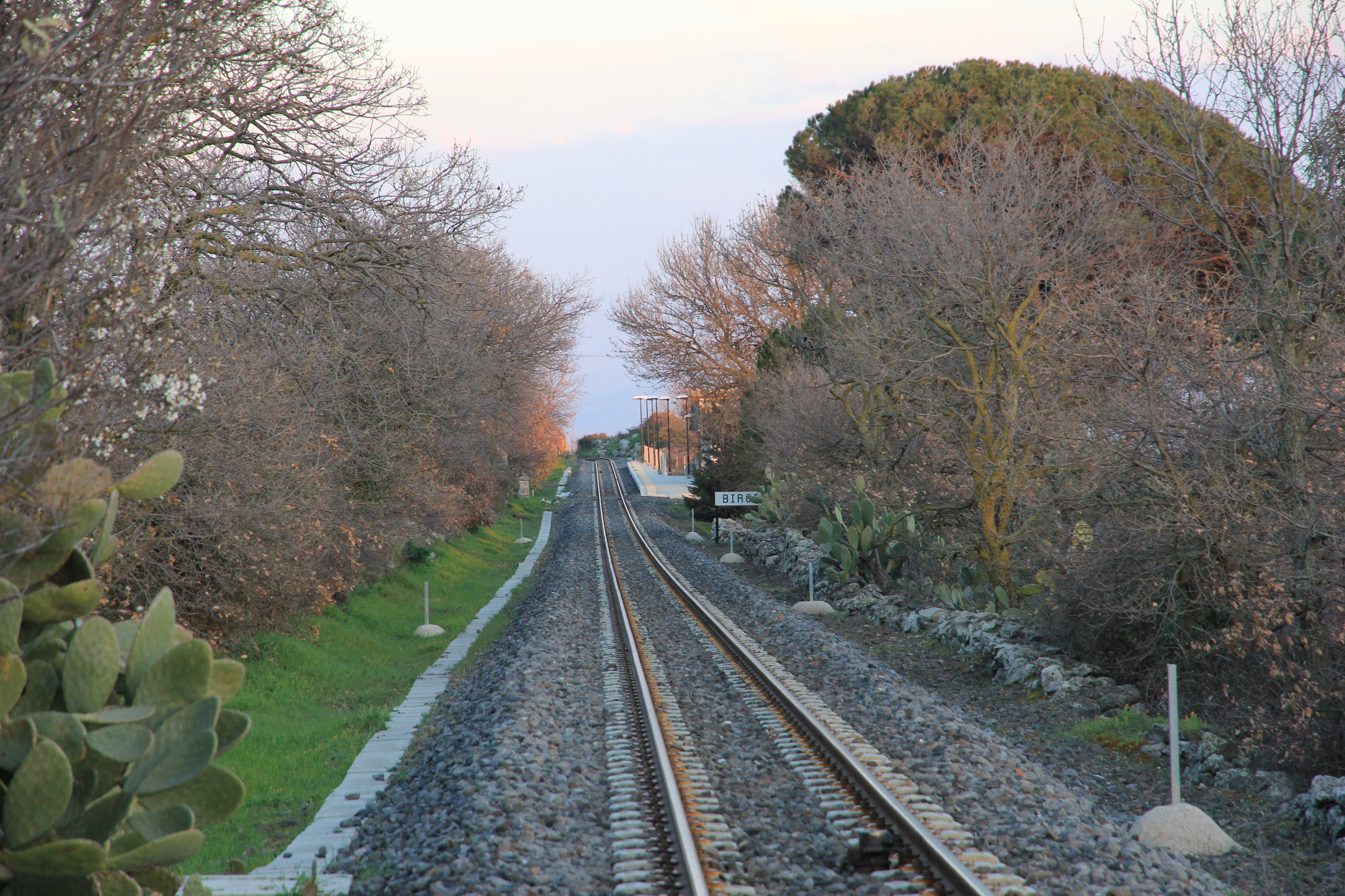 Stazione ferroviaria ARST di Birori